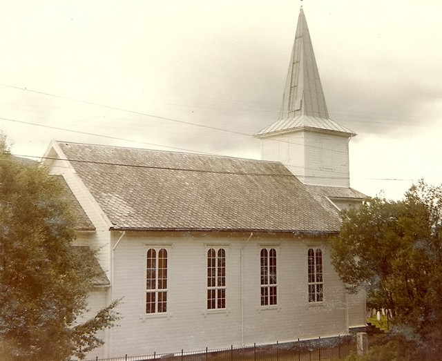 Totland kirke